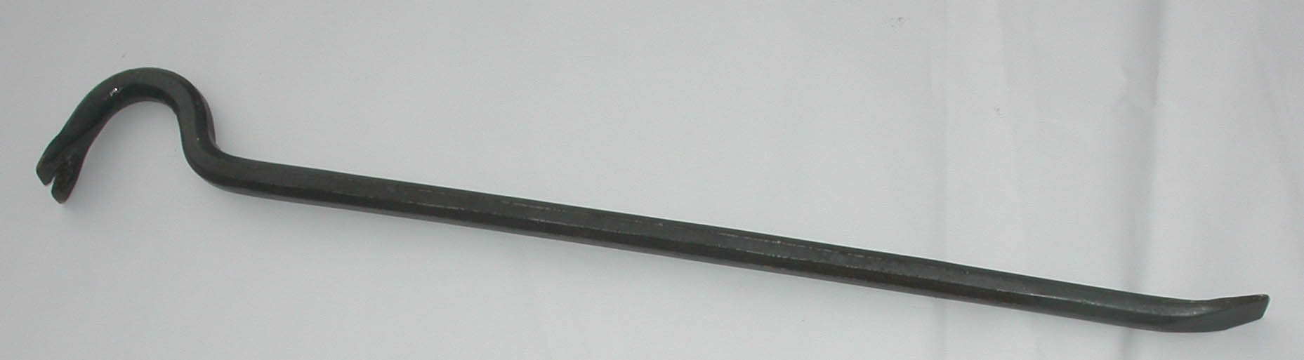 PINCE A CROSSE ET ARRACHE-CLOU